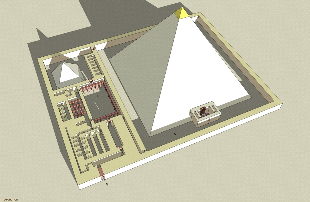 Essai d'élévation du complexe pyramidal d'Ouserkaf à Saqqarah - Ve dynastie égyptienne